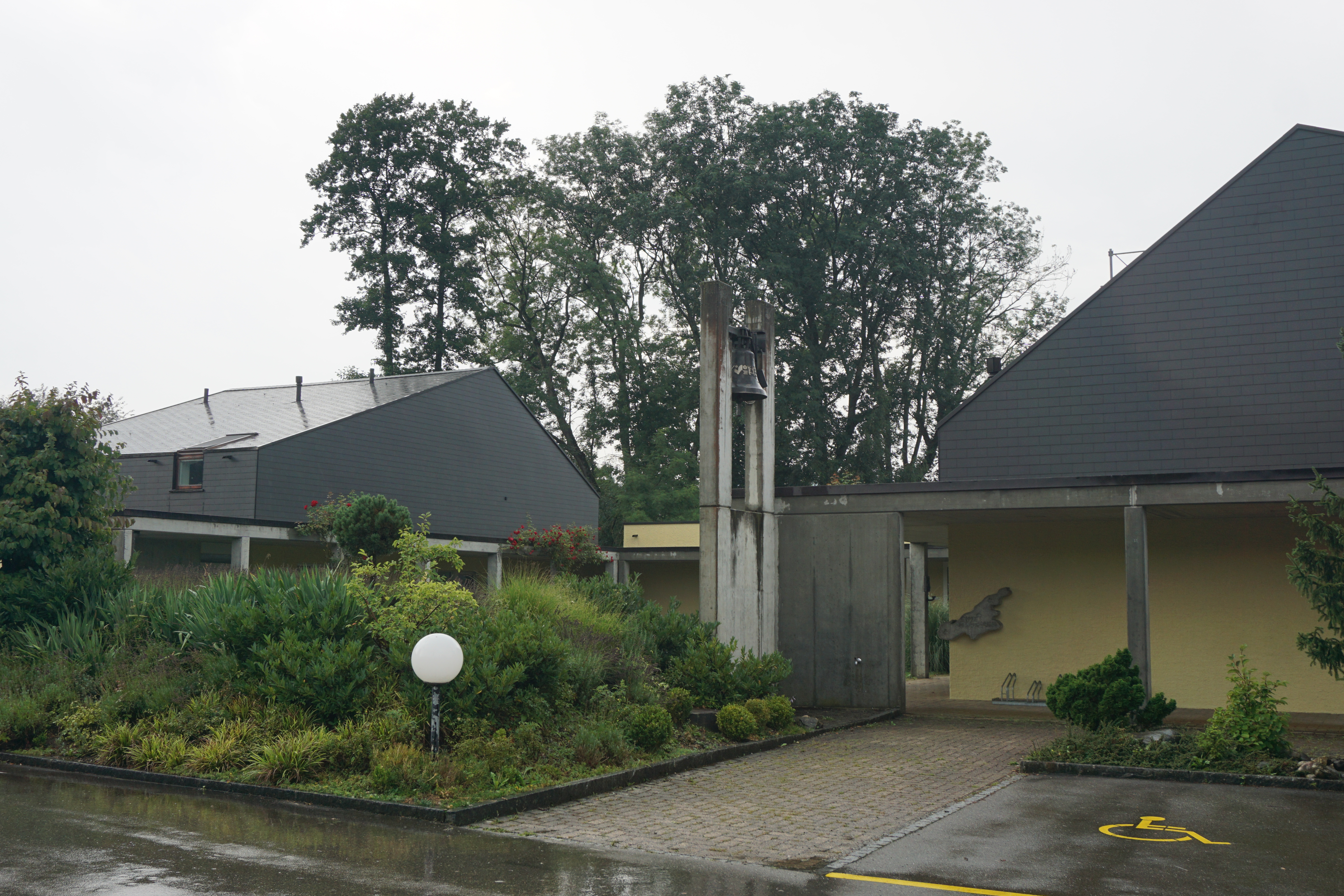 Kirche, Glockenträger und Pfarrhaus